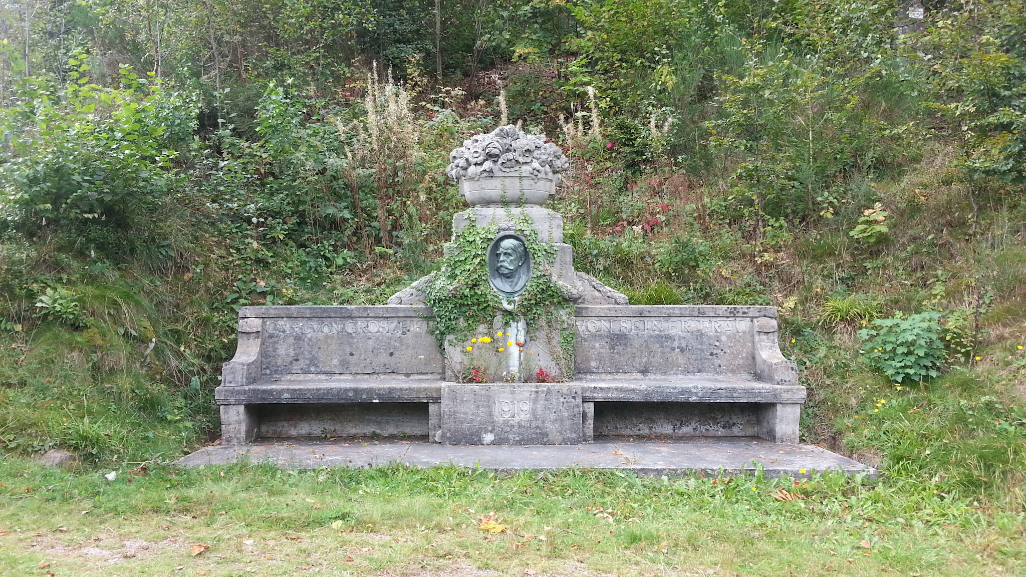 steinerene Sitzbank in Bad Rippoldsau (Schwarzwald), gestiftet als Denkmal für den Architekten Karl von Großheim von seiner Witwe